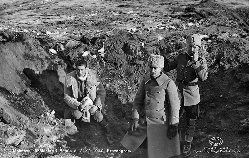 Krevadgrop efter bombningen av Pajala 1940